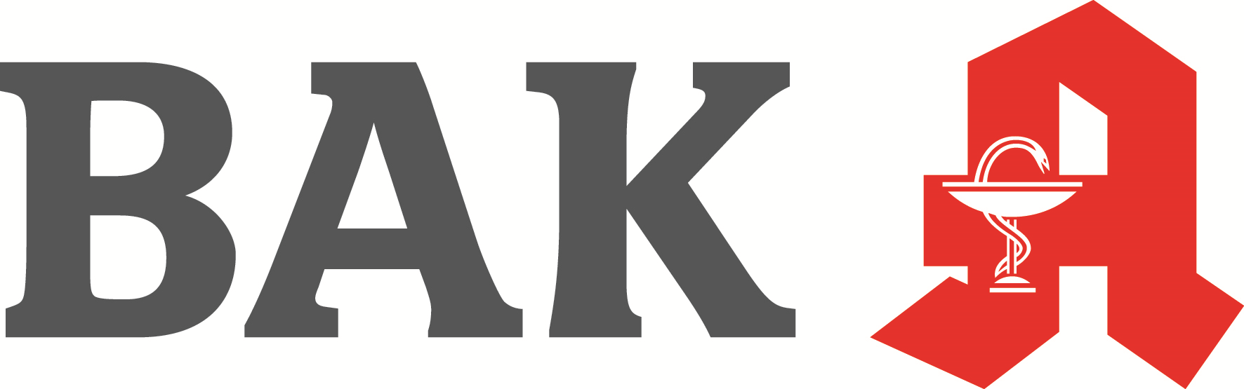 Logo von BAK